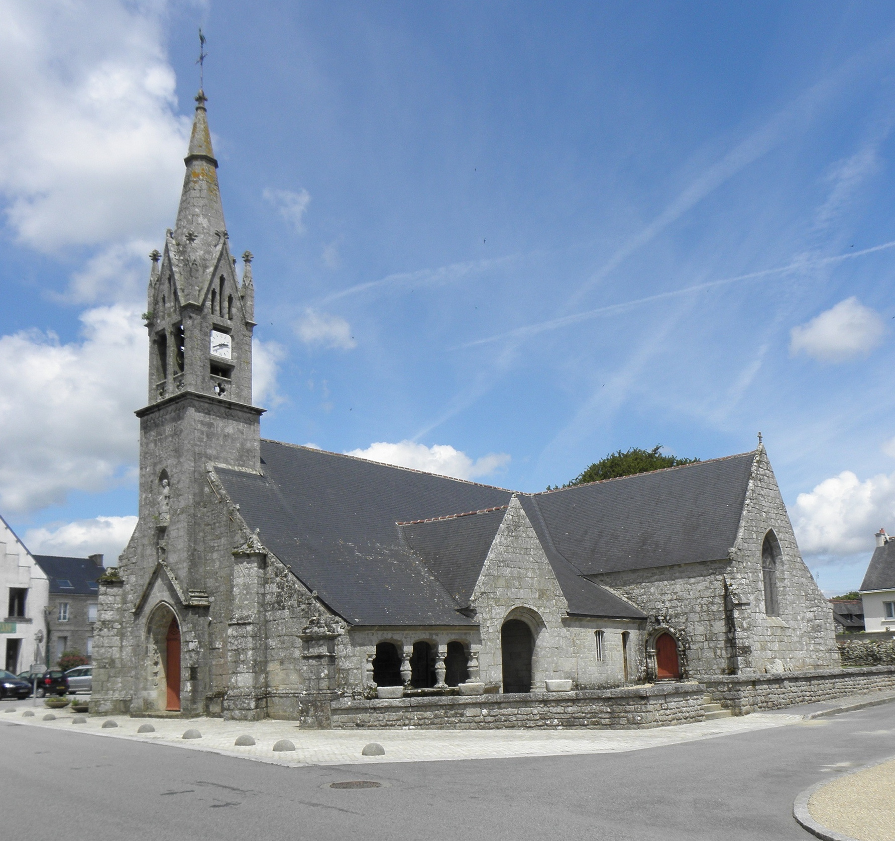 Église Saint-Jean-Baptiste de Le Croisty (56).